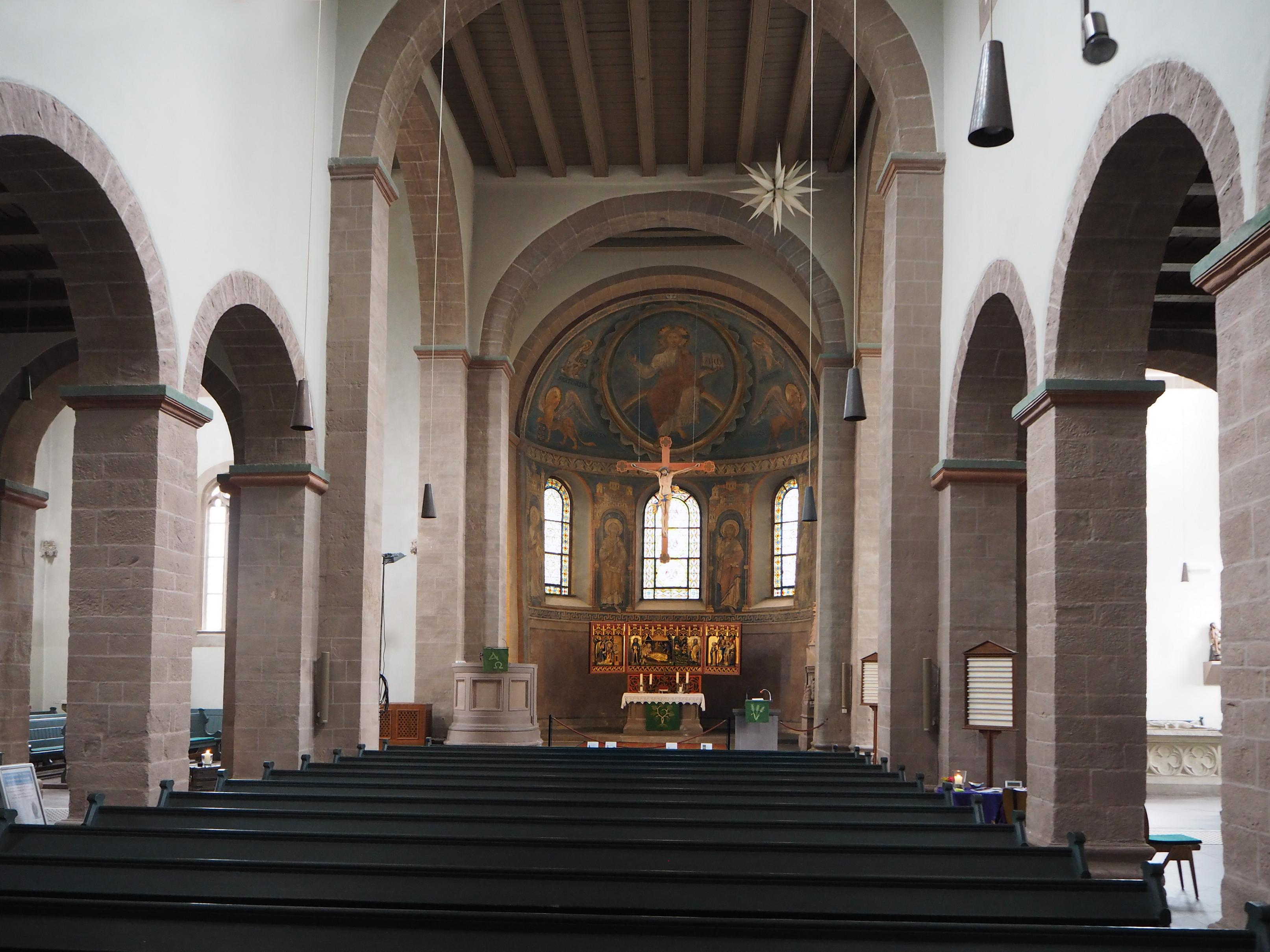 Bodenwerder-Kemnade (Niedersachsen), St. Maria (Ehem. Klosterkirche), Inneres nach Osten Blick auf den Altar, das Triumphkreuz und die ausgemalte Apsis